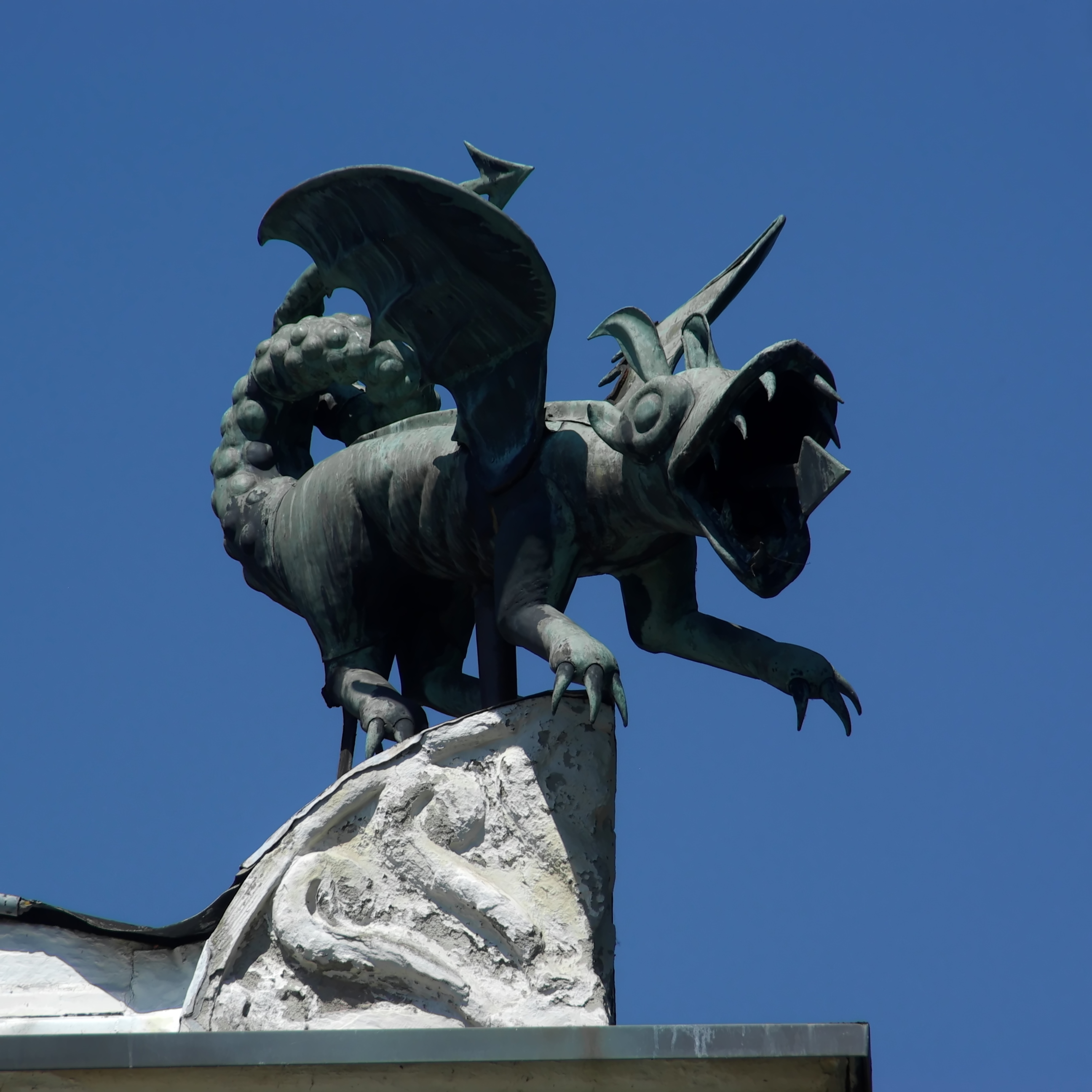 Trier, Drachenhaus